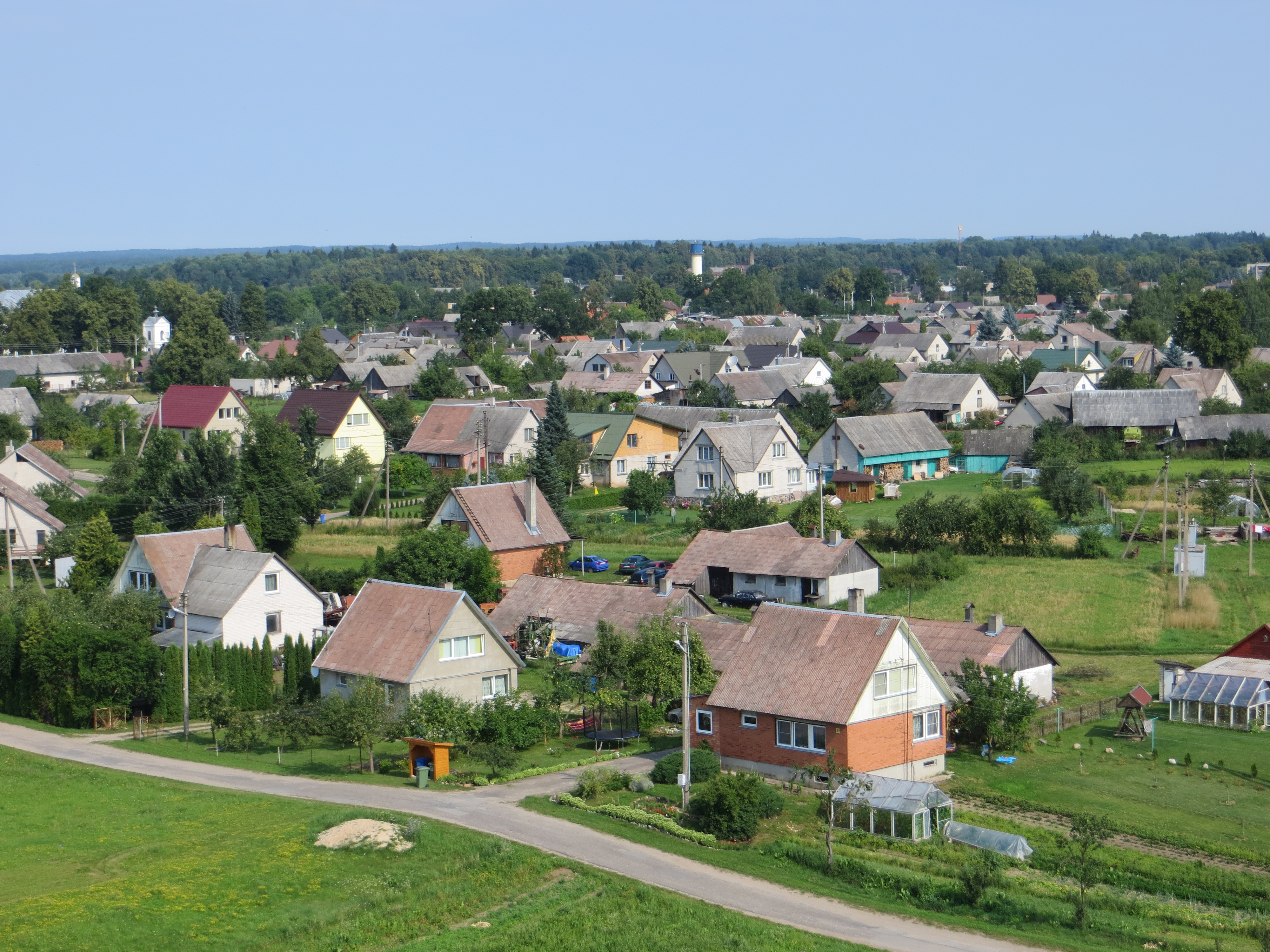 Leipalingio sen., Lithuania